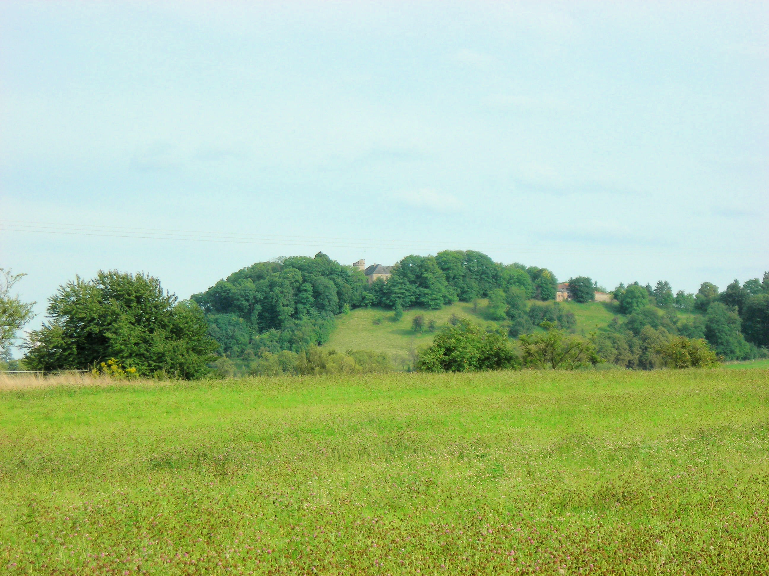 Château de Varsberg à Ham-sous-Varsberg (France)